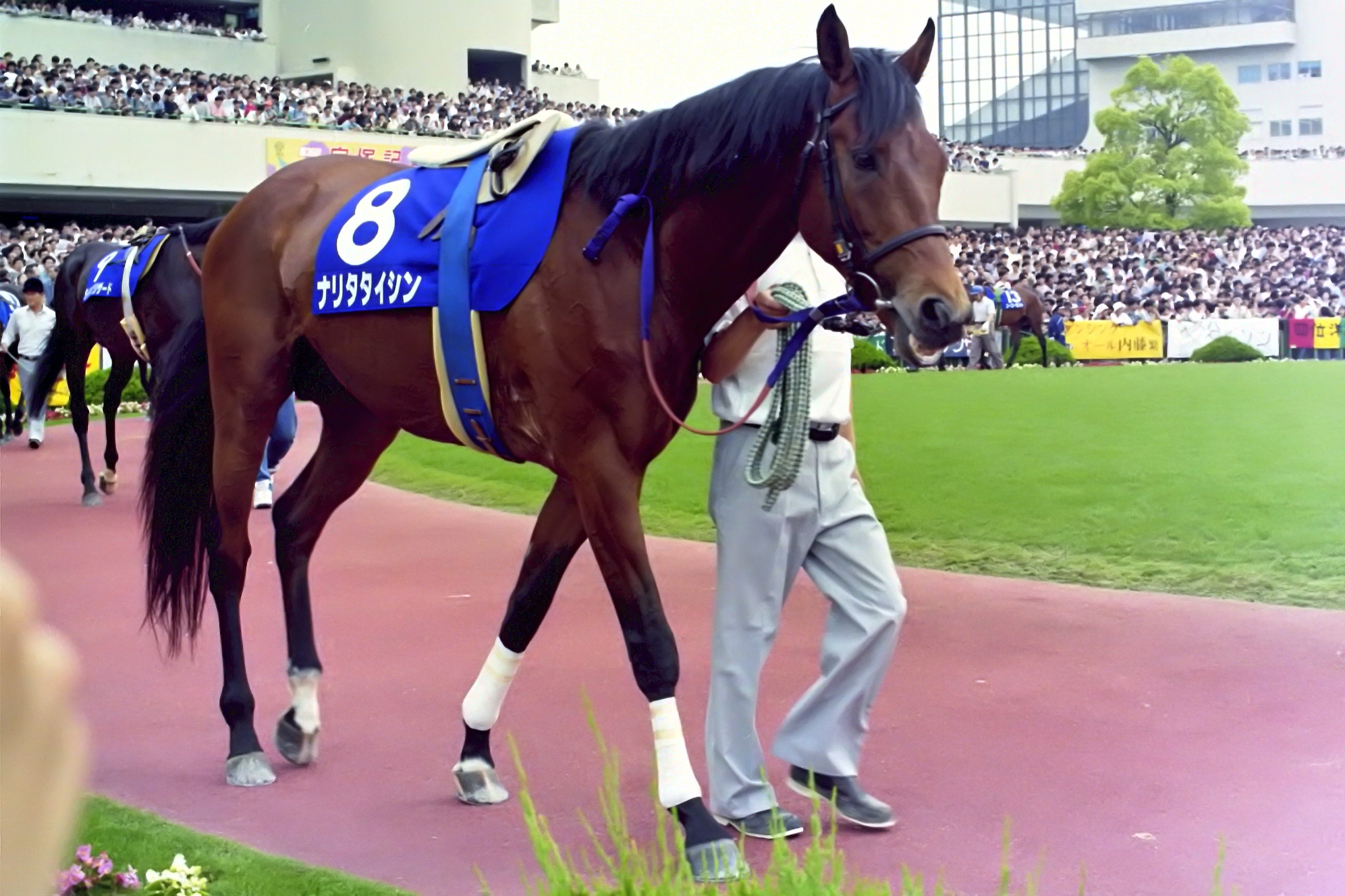 ナリタタイシン 1995年6月4日 京都競馬場